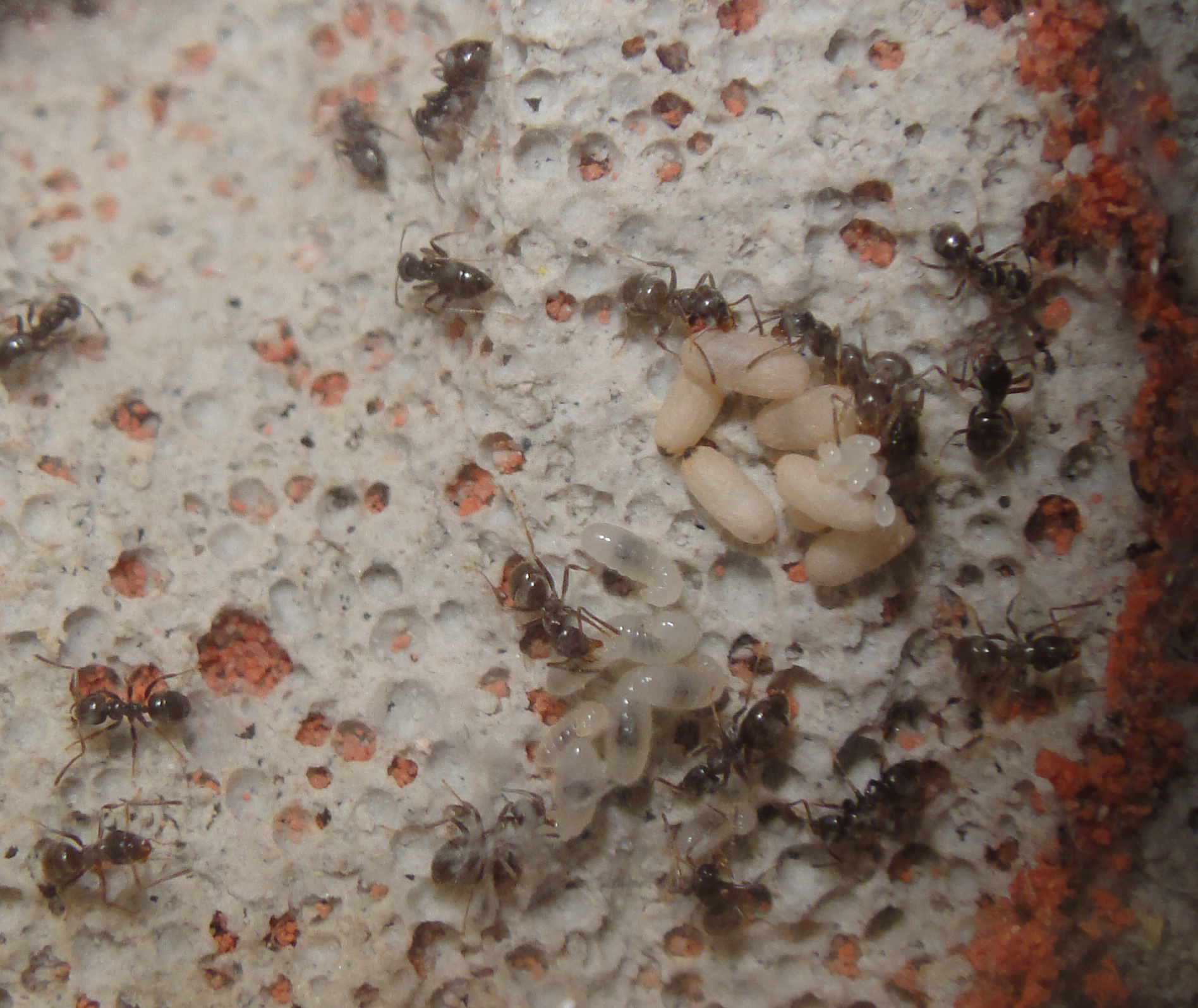 Fourmilière artificielle dans laquelle on peut voir des fourmis ouvrières avec les différentes étape du développement d'une fourmi : œuf (à droite sur les cocons), larve (à gauche), nymphe (ou cocon à droite).